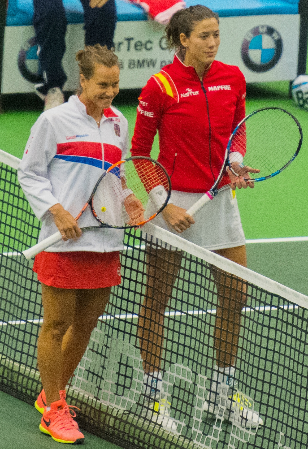 PPP_0161